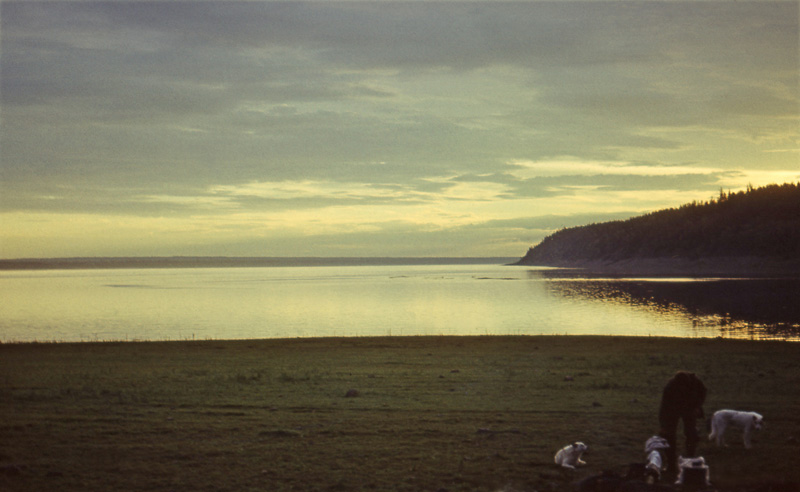 Bakhta. Вечер у поселка